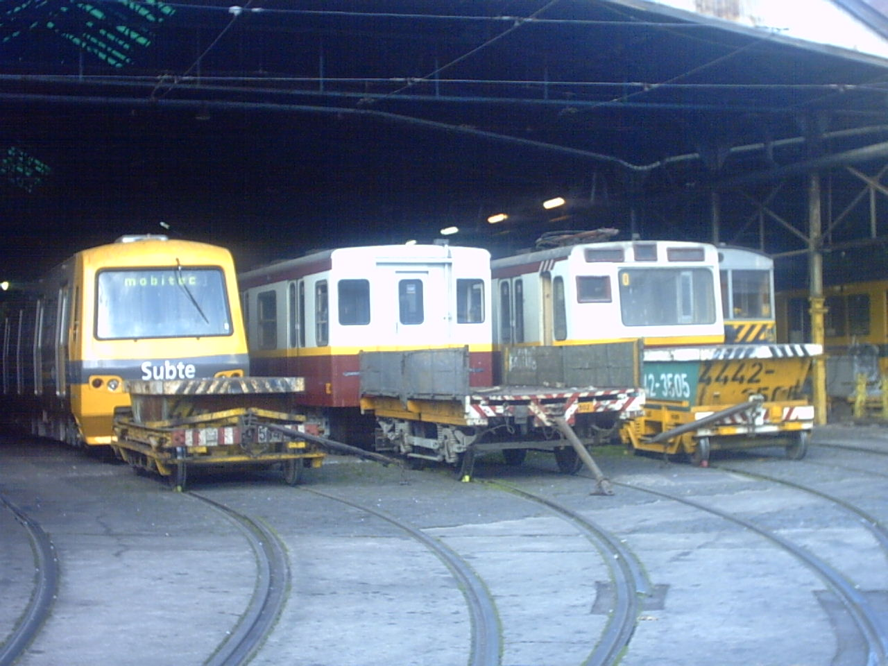 Depósito "Polvorín" de Metrovías, cochera de trenes del subterráneo de Buenos Aires, también utilizada para guardar tranvías de la AAT.